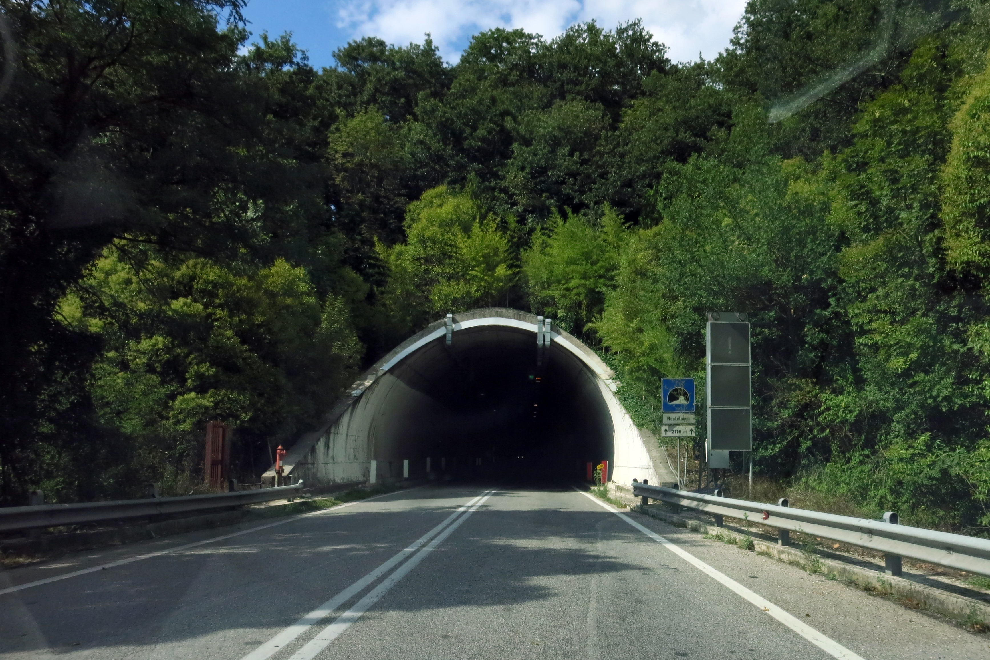 Strada statale 79 Ternana (superstrada Rieti-Terni) - imbocco sud (lato Rieti) della galleria Montelungo, fotografato viaggiando in direzione Terni